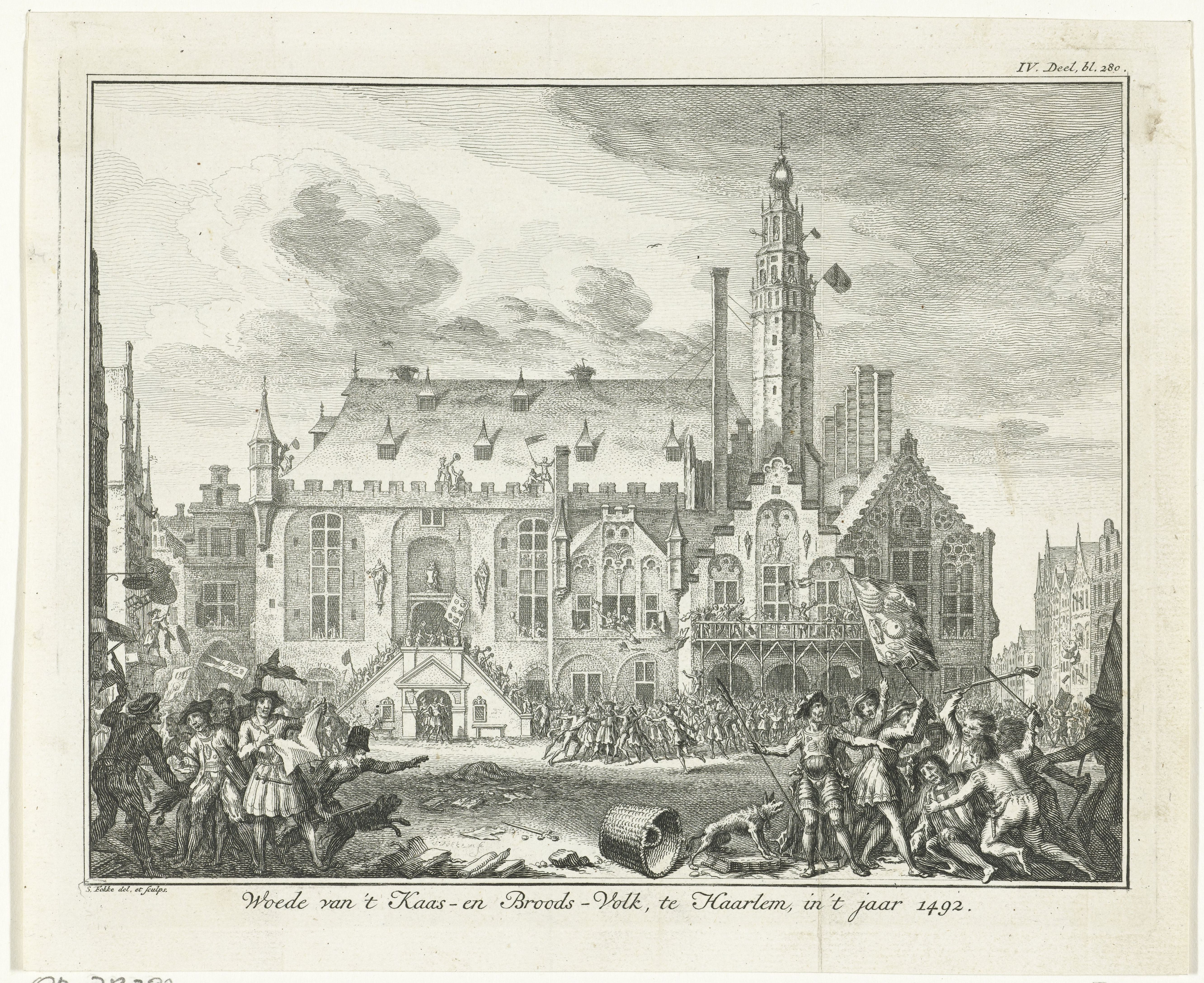 Opstanding van het Kaas- en Broodvolk in Haarlem in 1492, uitgegeven door Isaak Tirion voor auteur Jan Wagenaar (Vaderlandse Historie), gravure door Simon Fokke